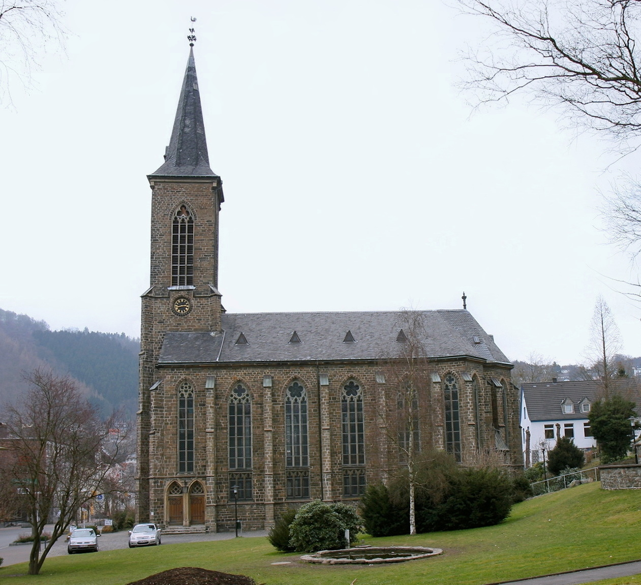 Evangelische Christuskirche in Werdohl. Neugotische Hallenkirche, erbaut 1866/1868, Denkmal.